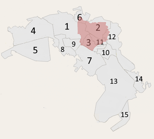 La divisione antropica di Calangianus